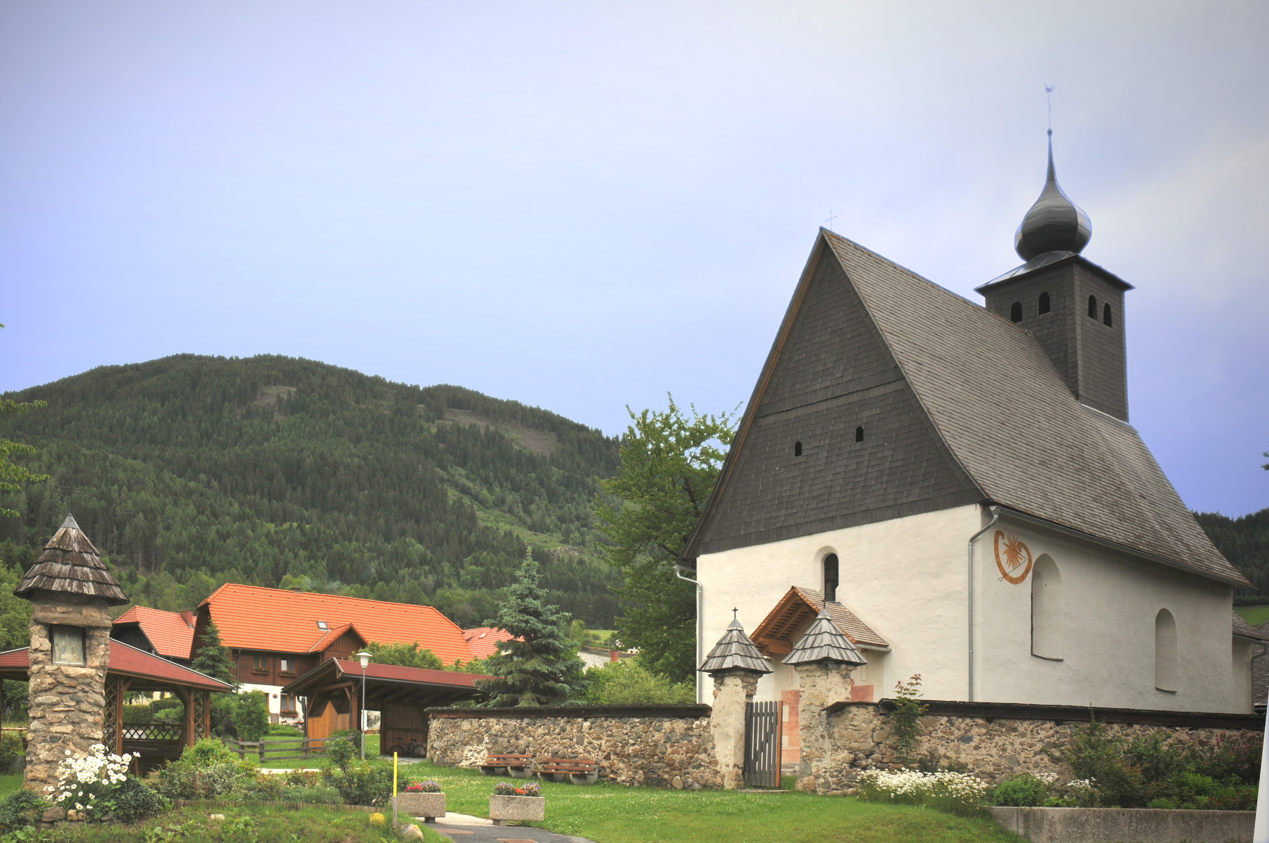 Kath. Filialkirche hl. Nikolaus mit ehem. Kirchhof